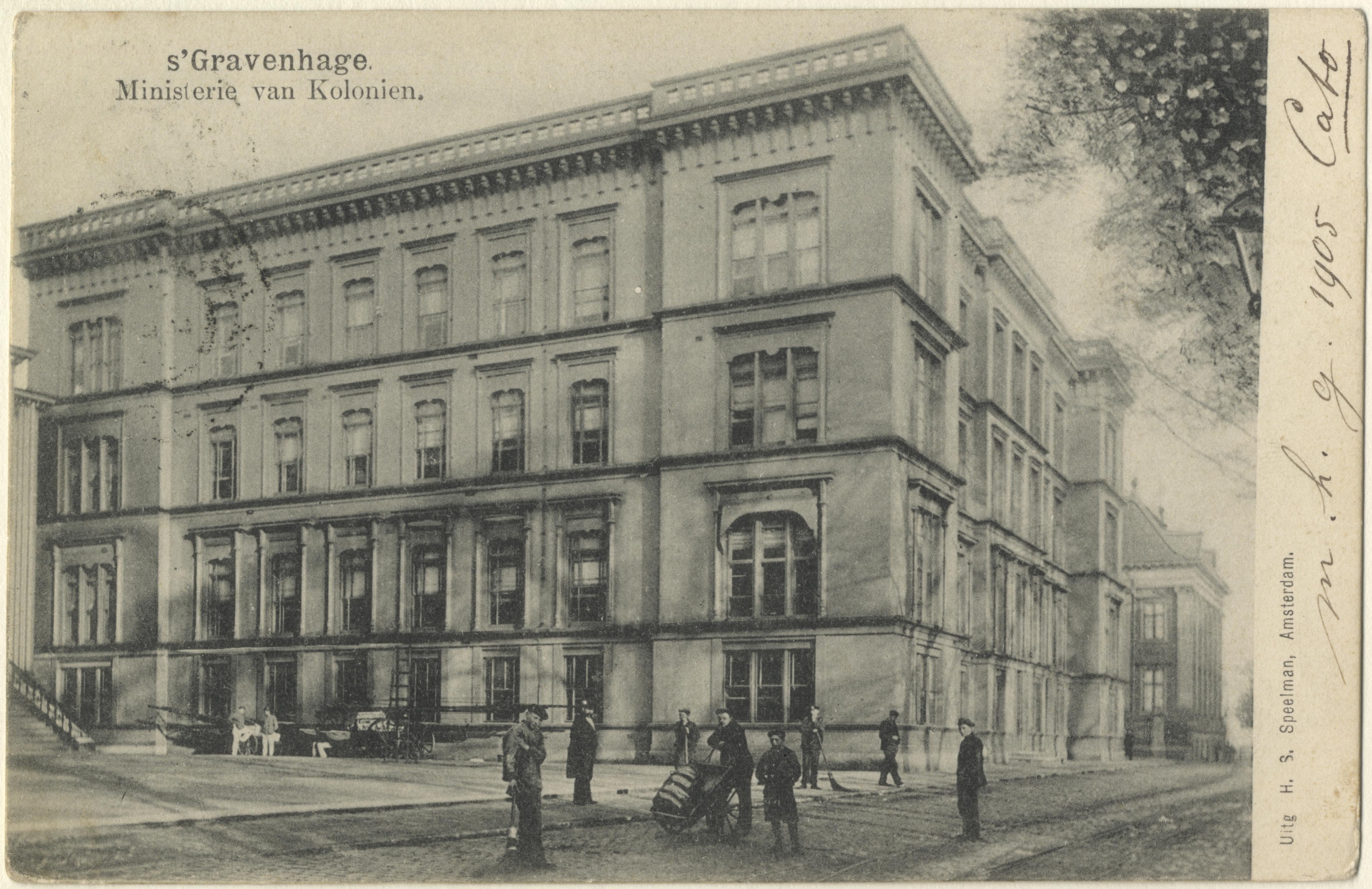 Prentbriefkaart Plein, ministerie van Koloniën